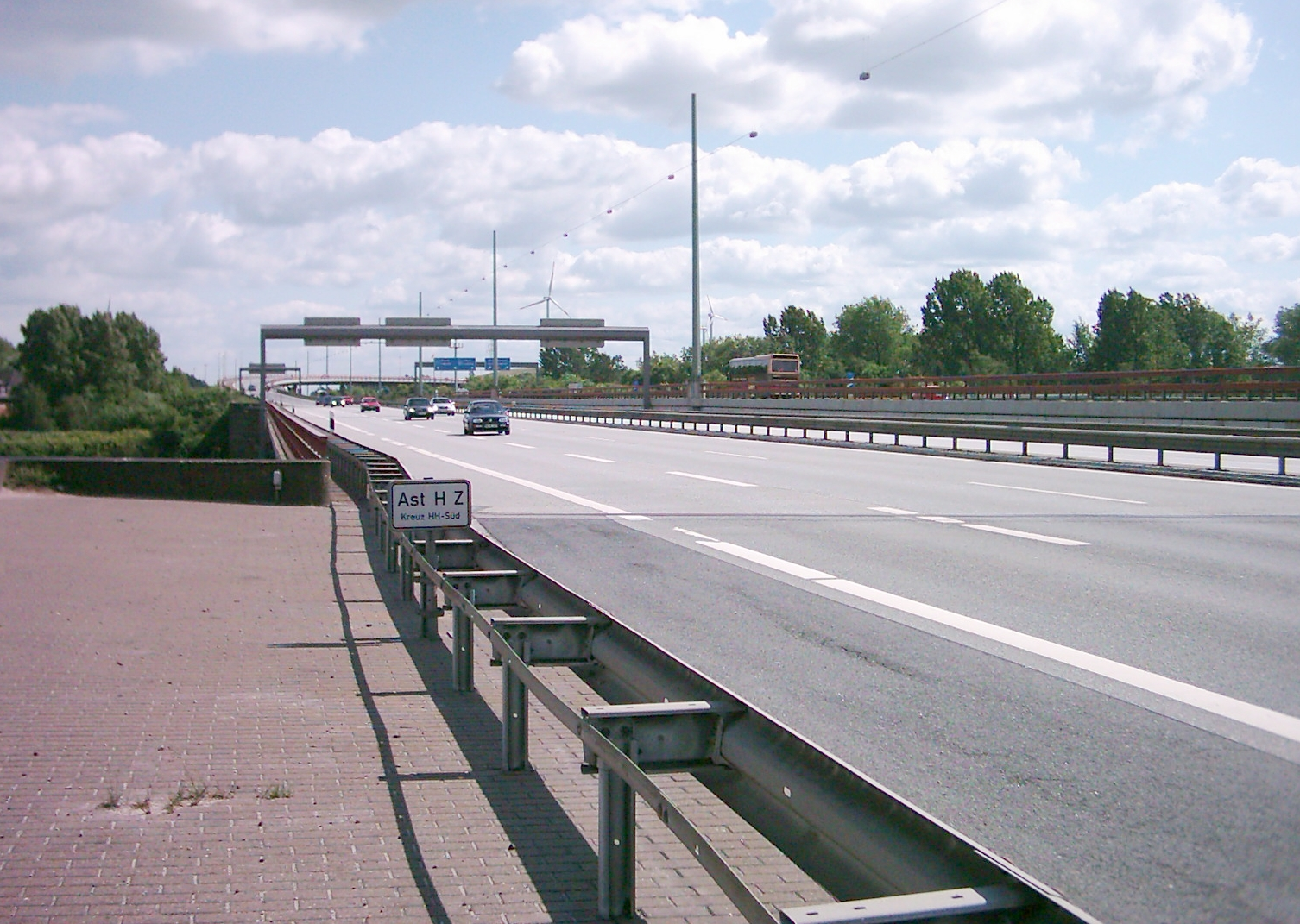 Die A 255 am Kreuz Hamburg-Süd. Blick Richtung Süden zur Bundesautobahn 1.